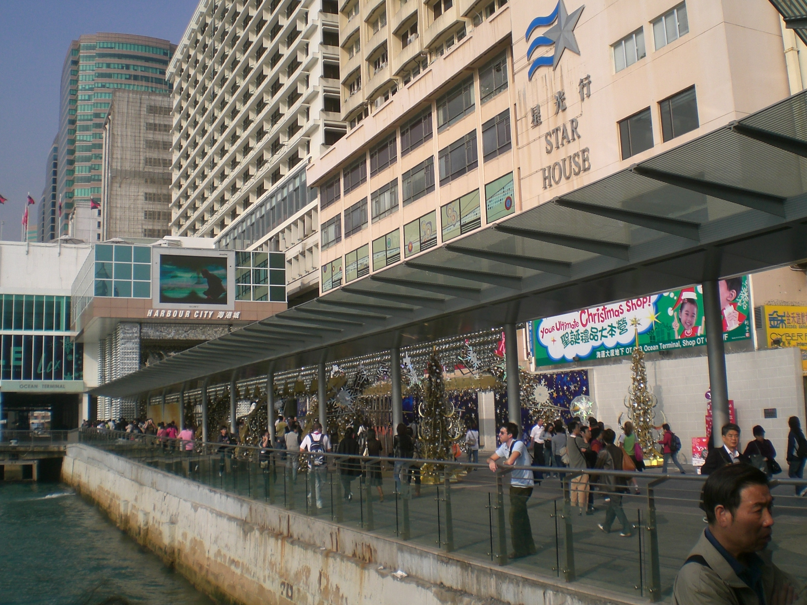 尖沙咀星光行及海港城, Star House